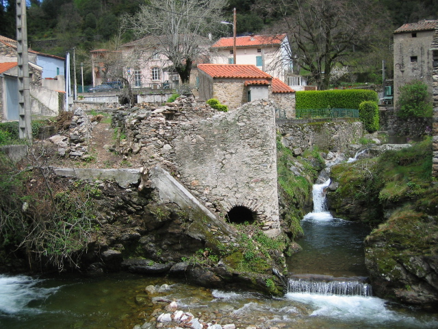 Castanet-le-Haut (Hérault)-Le Moulin de la Saigne du XVIe siècle, sur le ruisseau de Capials.Cité dans un acte de reconnaissances féodales de 1595